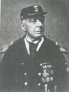 Foto van de in 1888 gestorven Jacob Hobein